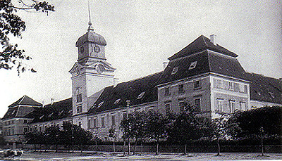 Schloss Rechnitz, Burgenland, Österreich, ca. um 1930 (Reproduktion)